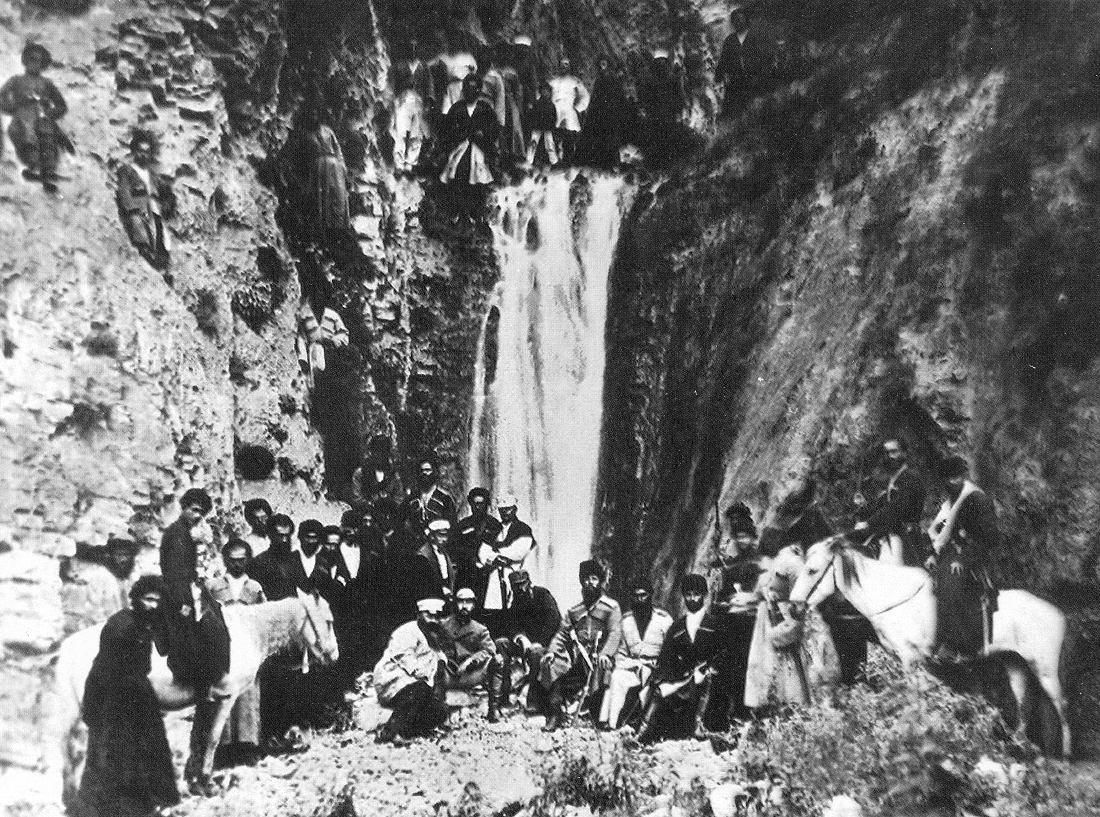 Д. И. Менделеев во главе научной экспедиции вместе с горцами-ингушами у Фуртоугского водопада. ГӀалгӀай: Менделеев И. Д. лоамарой-гIалгIашца цхьанна Фуртоугера хурхала йисте.